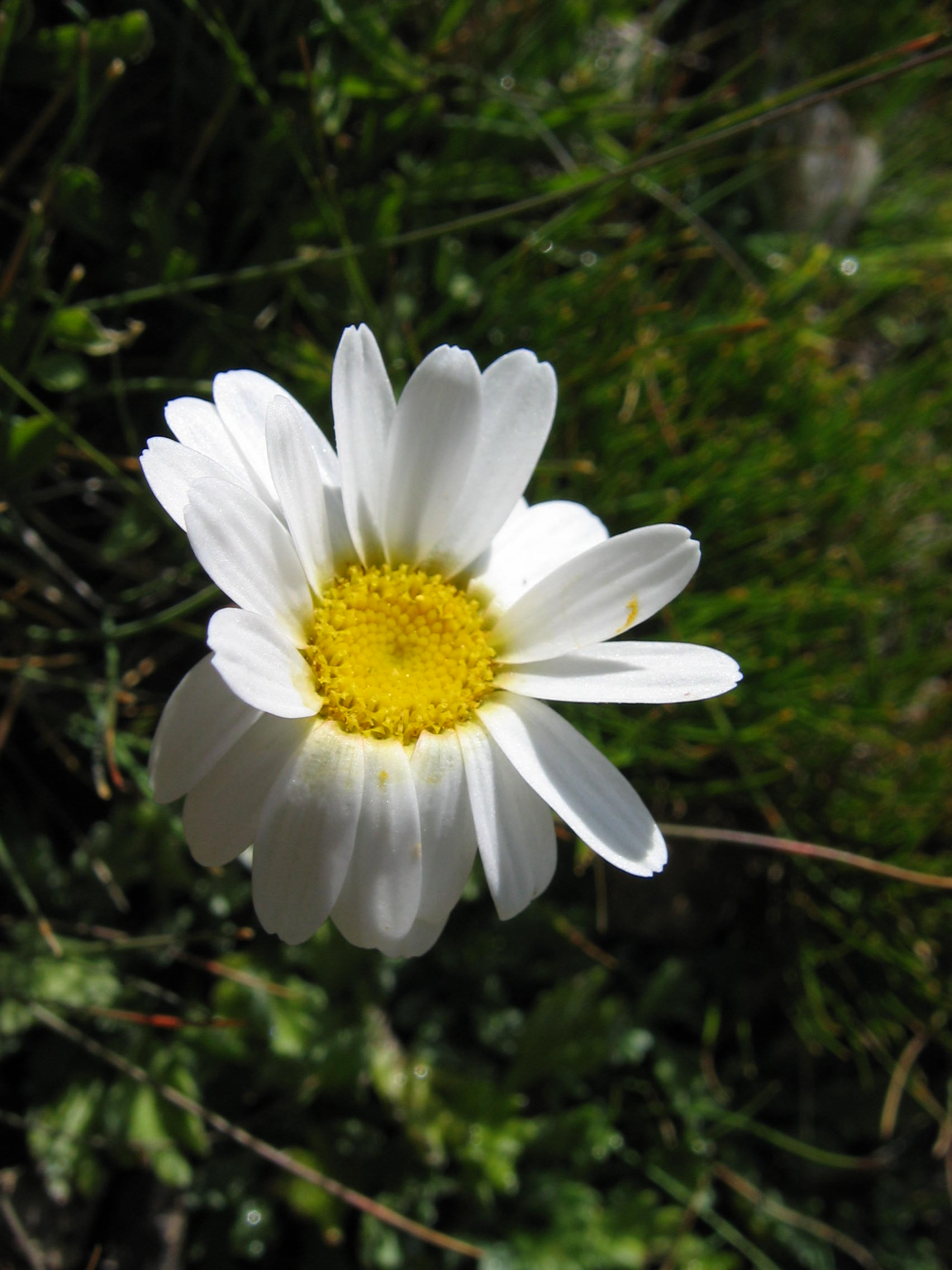 Leucanthemopsis alpina : Tour de la tête des Toillies - (Piémont, Italie)